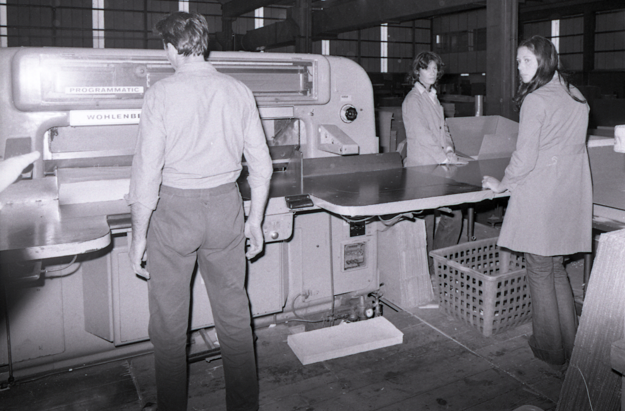 Servizio fotografico : Villa Lagarina, 1980 / Paolo Monti. - Strisce: 2, Fotogrammi complessivi: 8 : Negativo b/n, gelatina bromuro d'argento/ pellicola ; 35 mm. - ((Sul portanegativi: N[I]K[O]R[MAT] FP4. - La serie è identificata da Monti con segni grafici e iscrizioni inventariali, e distinta dalla successiva. - Occasione: Documentazione dello stabilimento di Val Lagarina (su ordinazione del Signor Ricci). - Fonte: Fattura di Paolo Monti: IV. Commesse/ Fattura n. 02/ Fotografie stabilimento di Val Lagarina (1978/01/25), presso Archivio Paolo Monti. N. 20 fotografie a colori e 5 foto in b/n scelte da 60 a colori e 40 in b/n. [...] Spese soggiorno per 2 giorni.